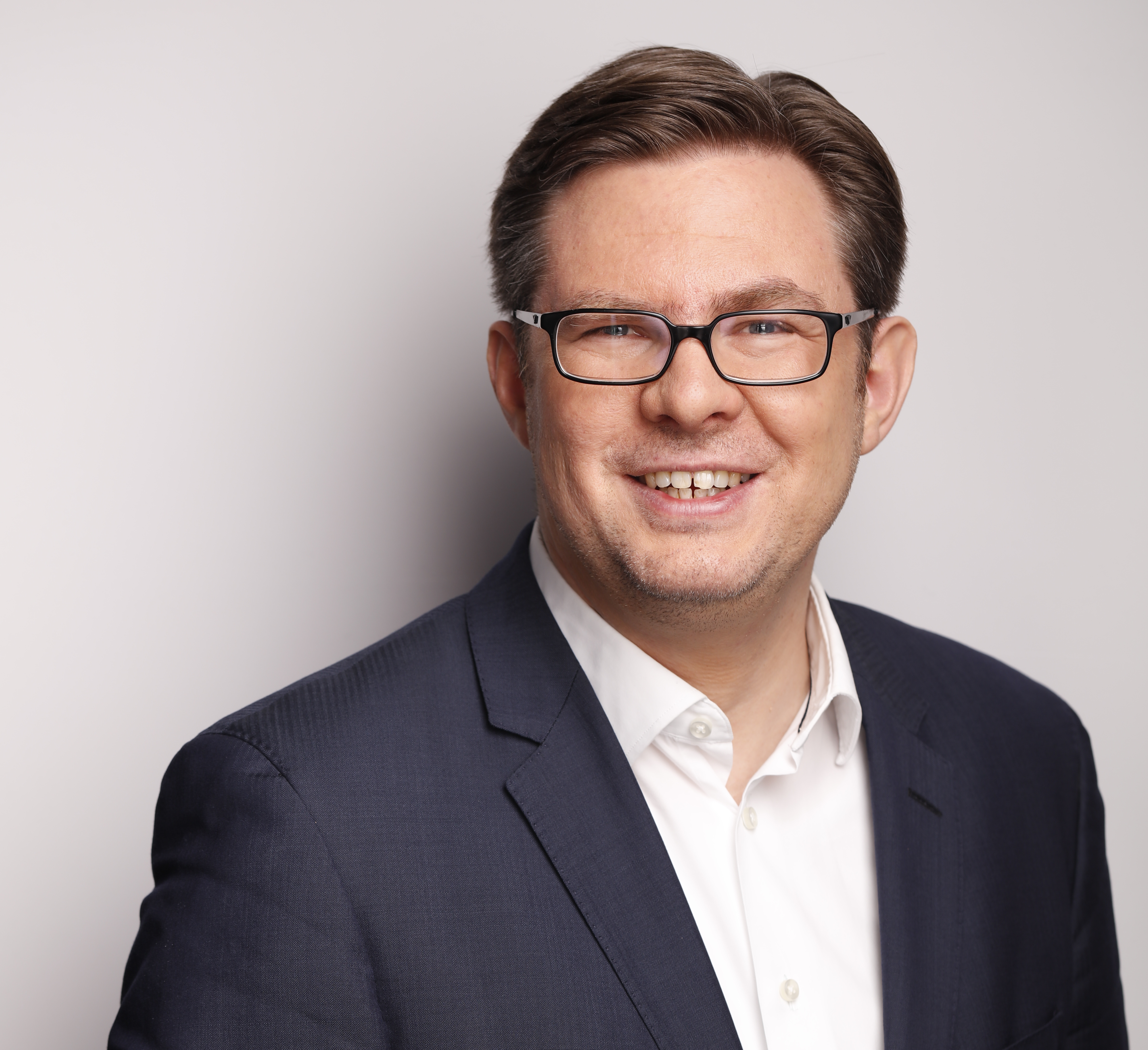 Martin Rosemann, Pressefoto 2017